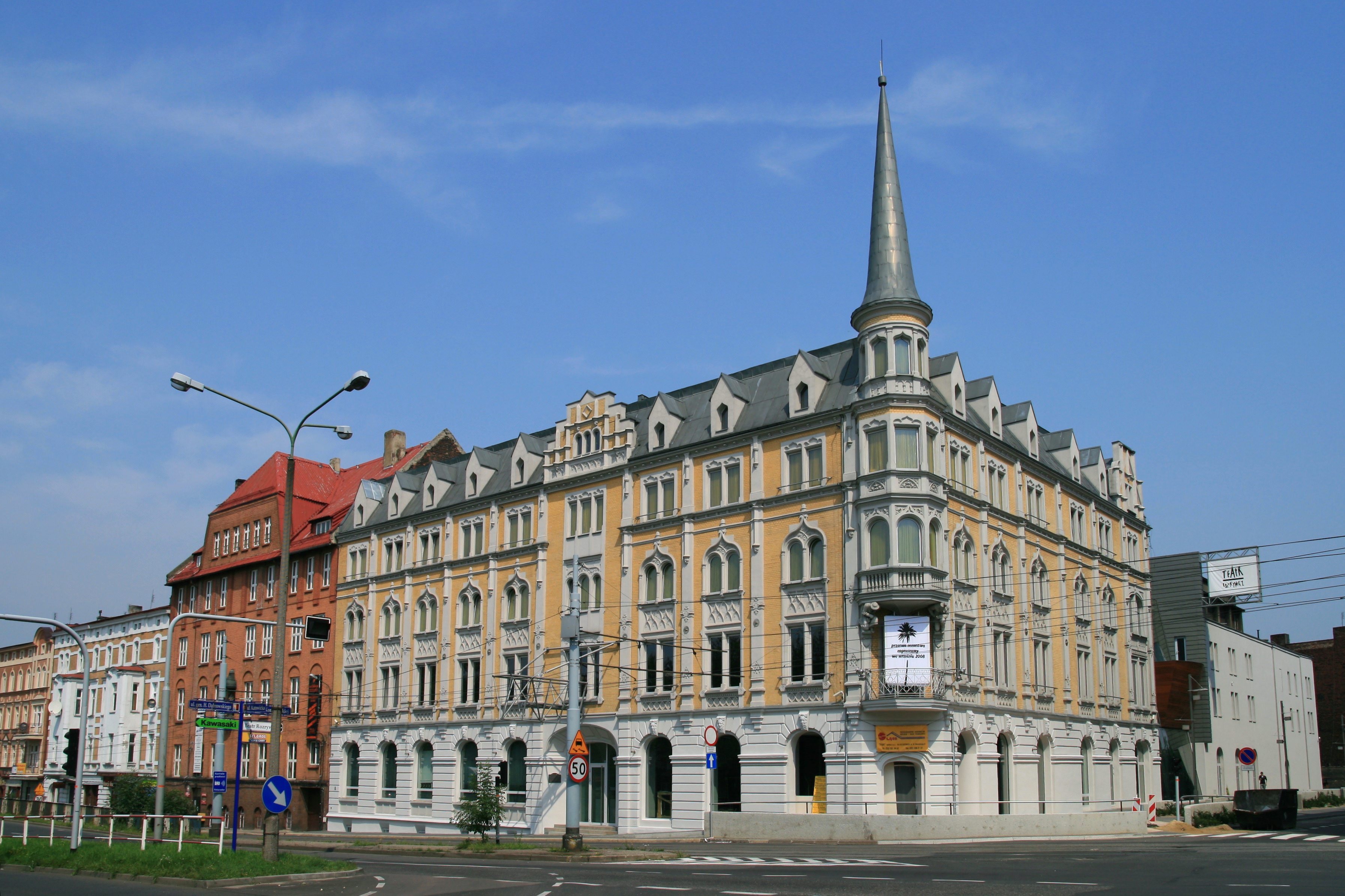 Teatr Rozrywki (na rogu ul. Katowickiej i ul. Konopnickiej) w Chorzowie.